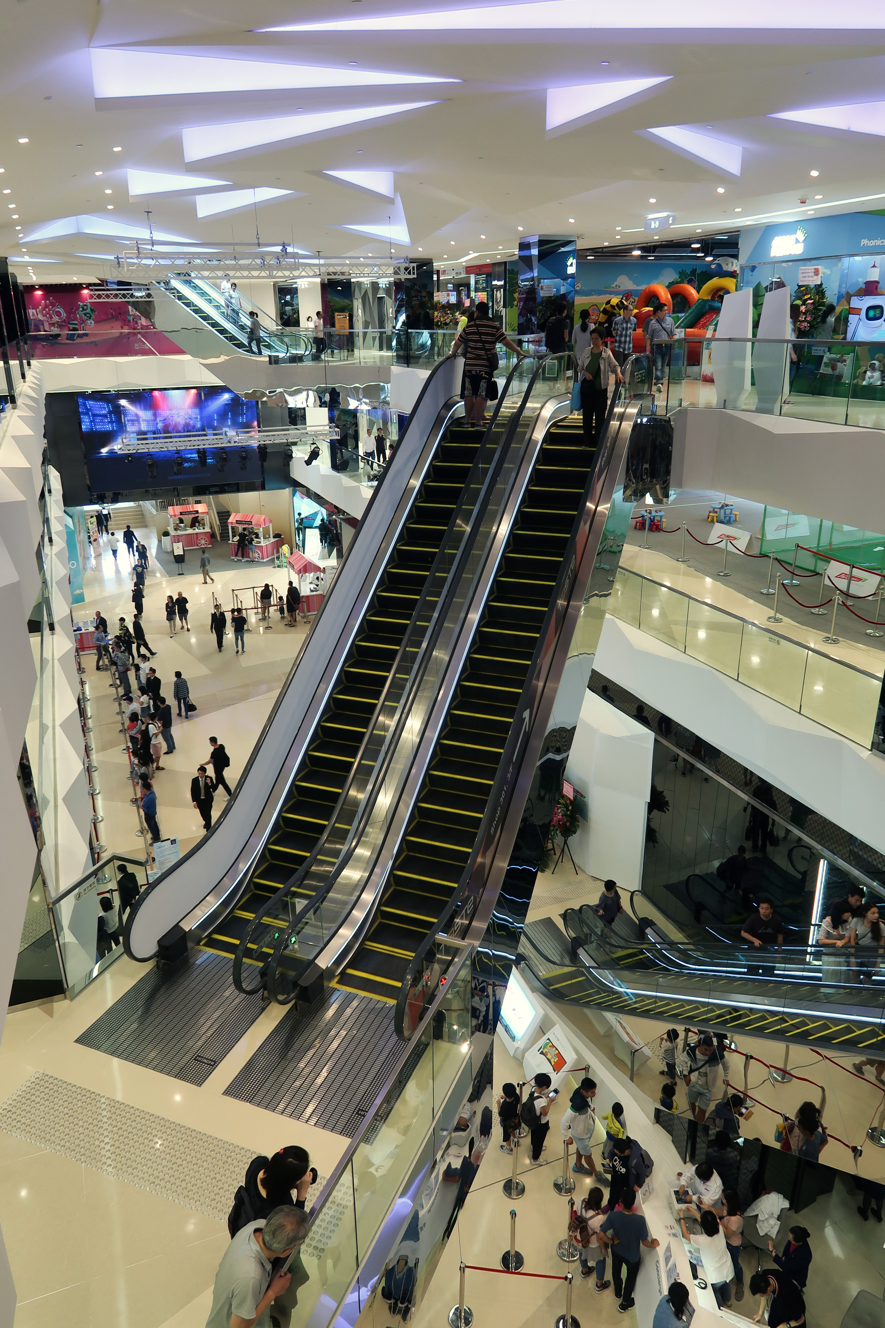 We Go MALL